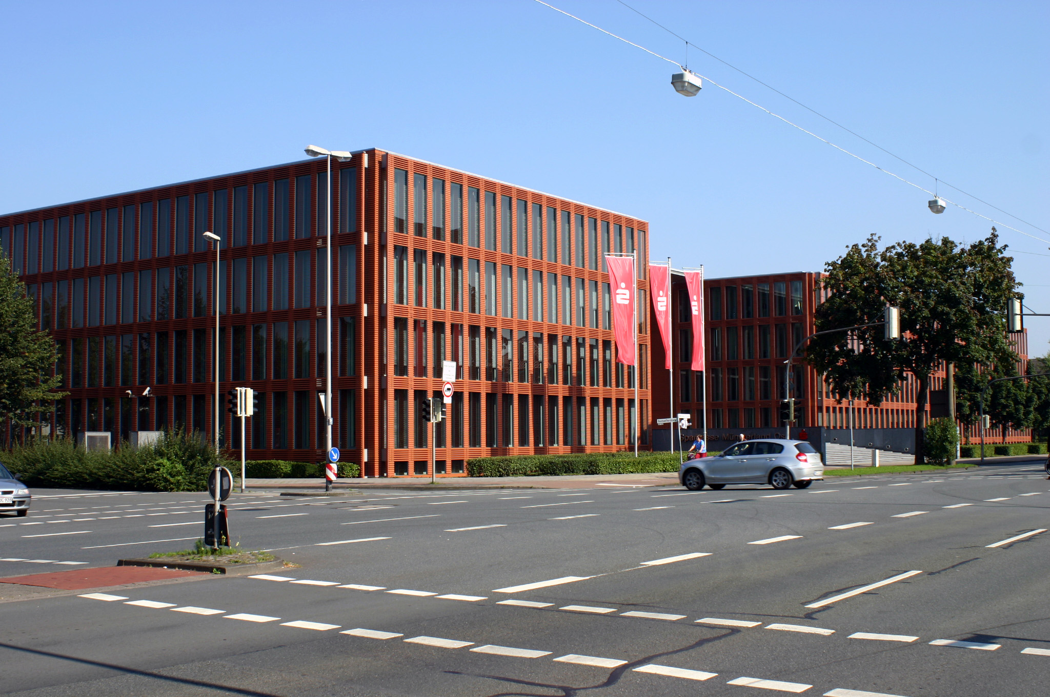 Münster, Sparkassenzentrale, Weseler Str.